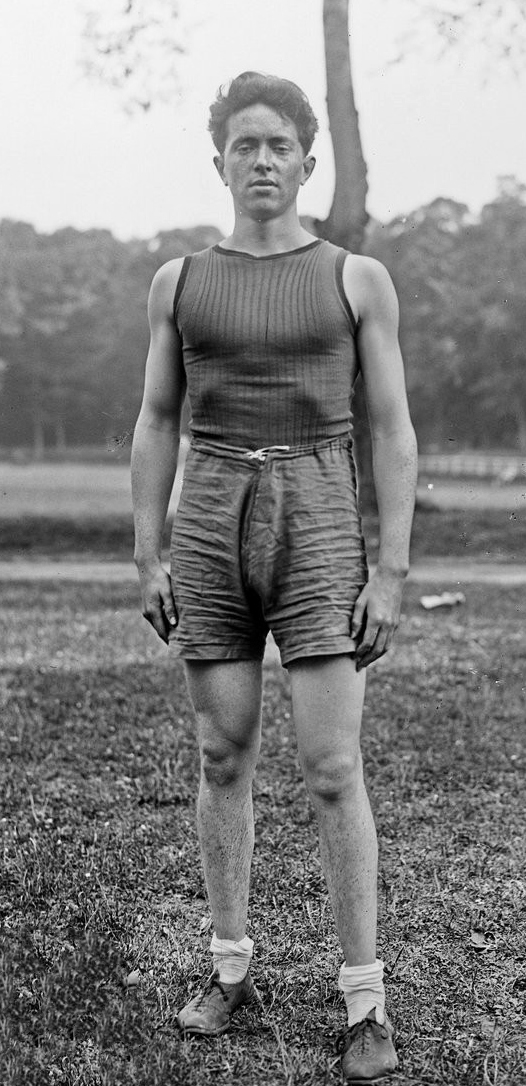 [Pierre] Guilloux [à St Cloud, le 26 mai 1921]